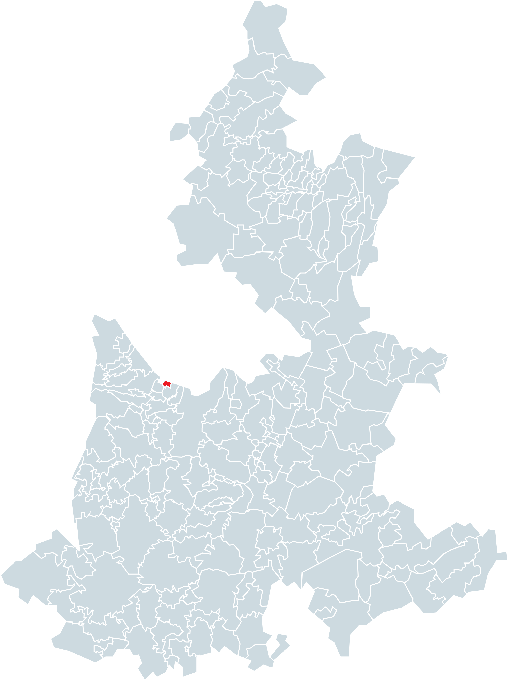 Municipio de San Miguel Xoxtla